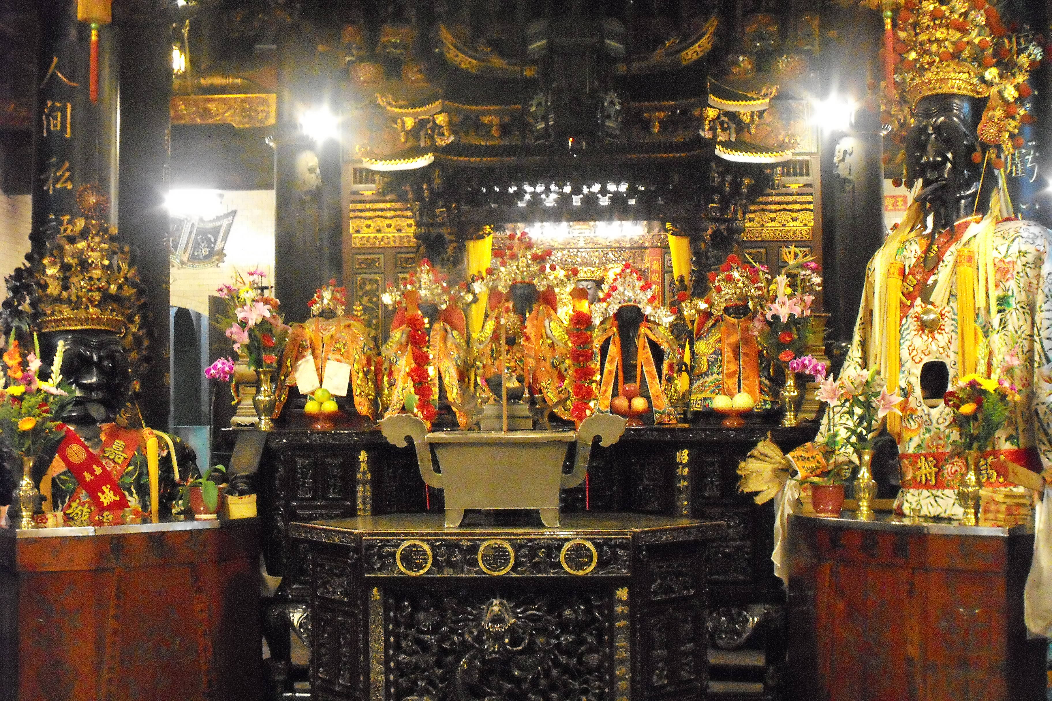 嘉邑城隍廟